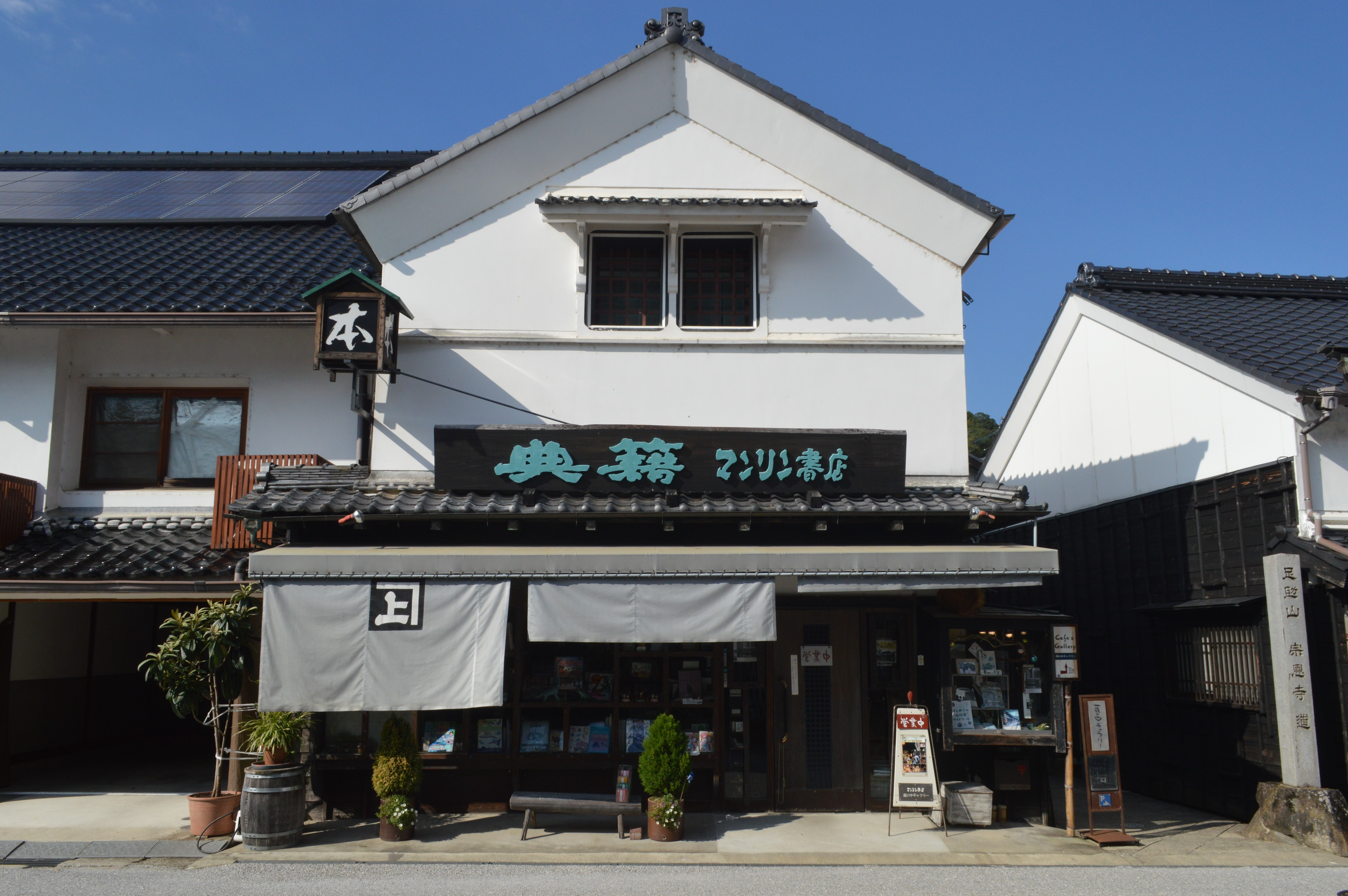 愛知県豊田市足助町にあるマンリン書店。右側はマンリン小路。